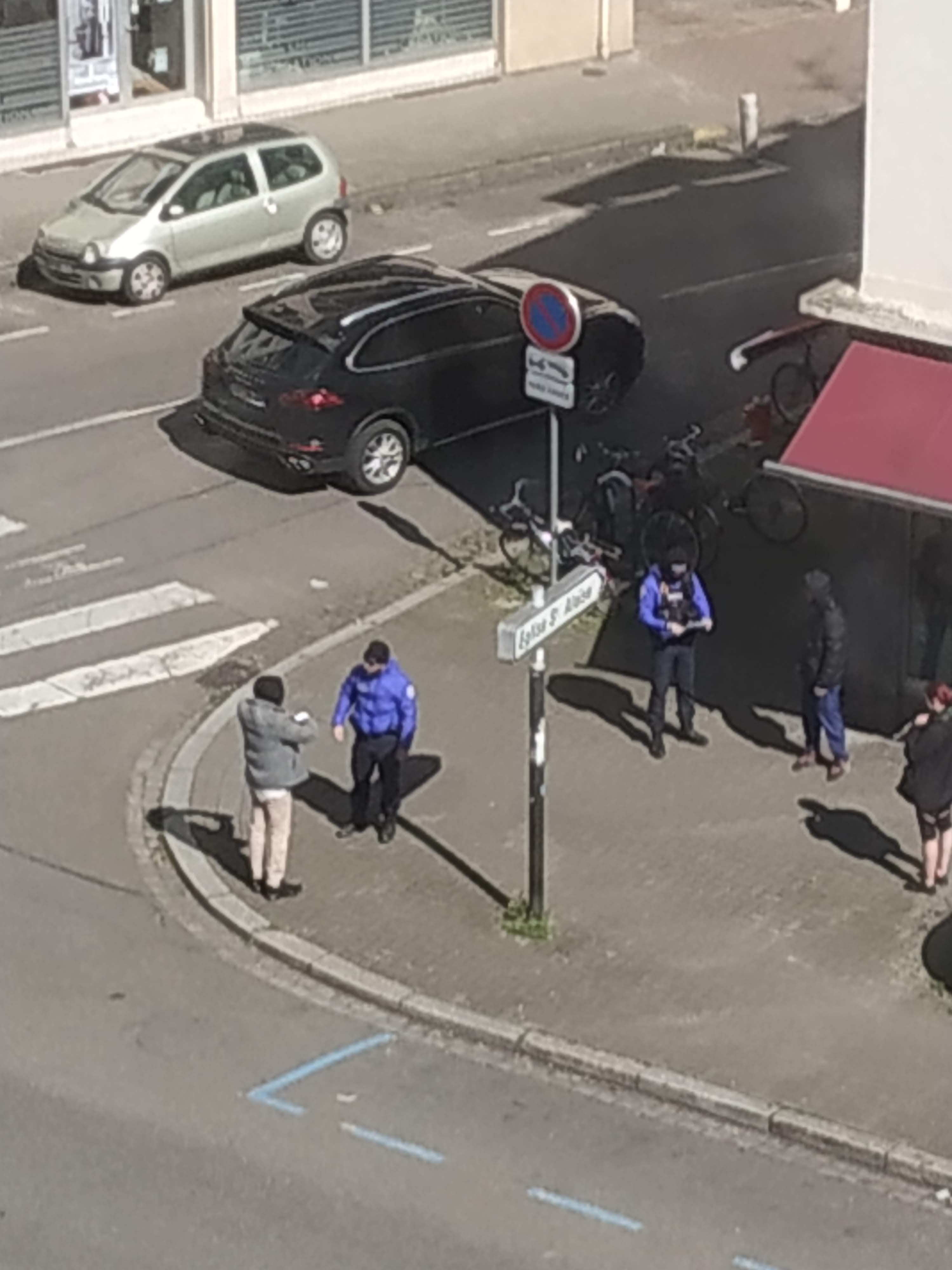 Dans le cadre du confinement de mars 2020, des policiers nationaux effectuent des contrôles des attestations dans les rues, dans le quartier du Neudorf à Strasbourg